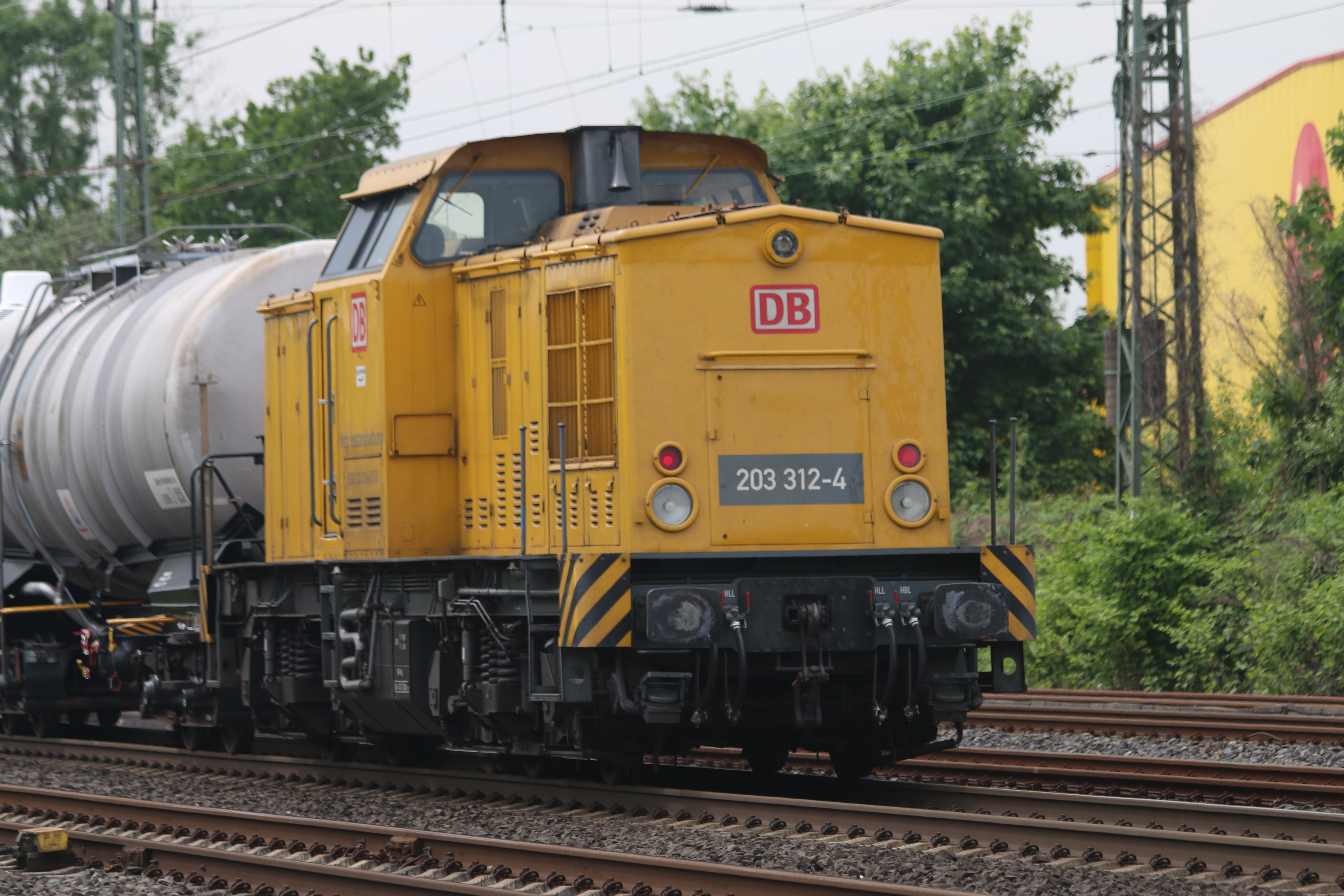 DR-Baureihe V 100 (203 312-04) der DB Netz Instandhaltung auf der Bahnstrecke Wanne-Eickel–Hamburg am BÜ km 62,017 am 24.05.2017